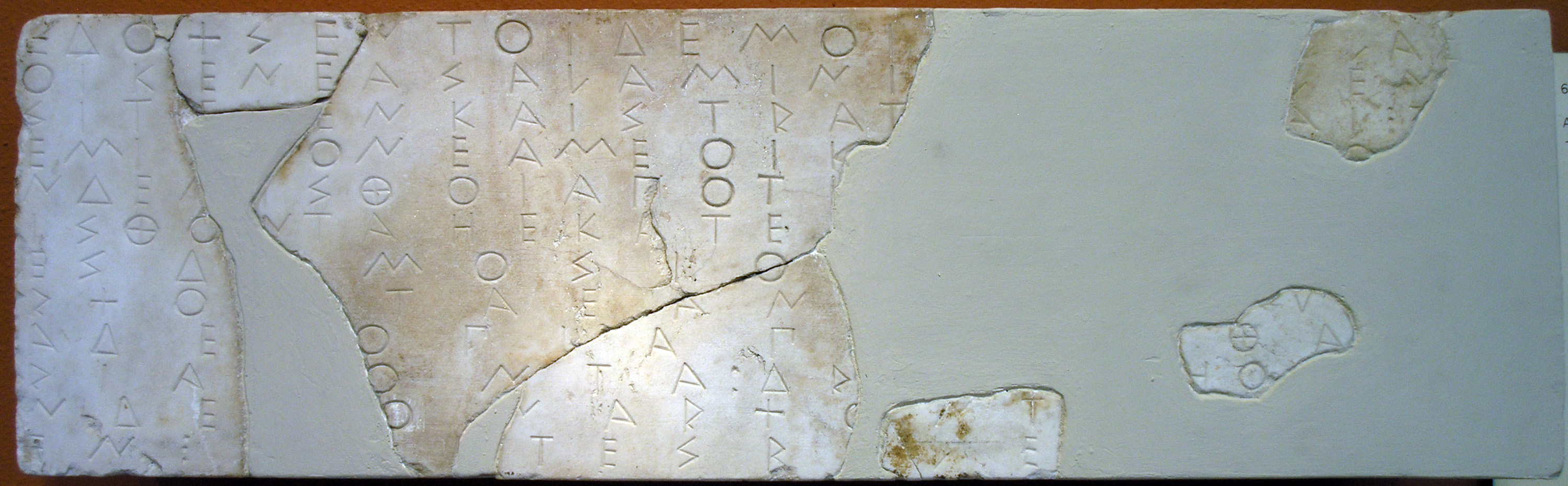 Le plus ancien décret athénien connu réglementant le statut des clérouques à Salamine. 510-500 av. J.-C.